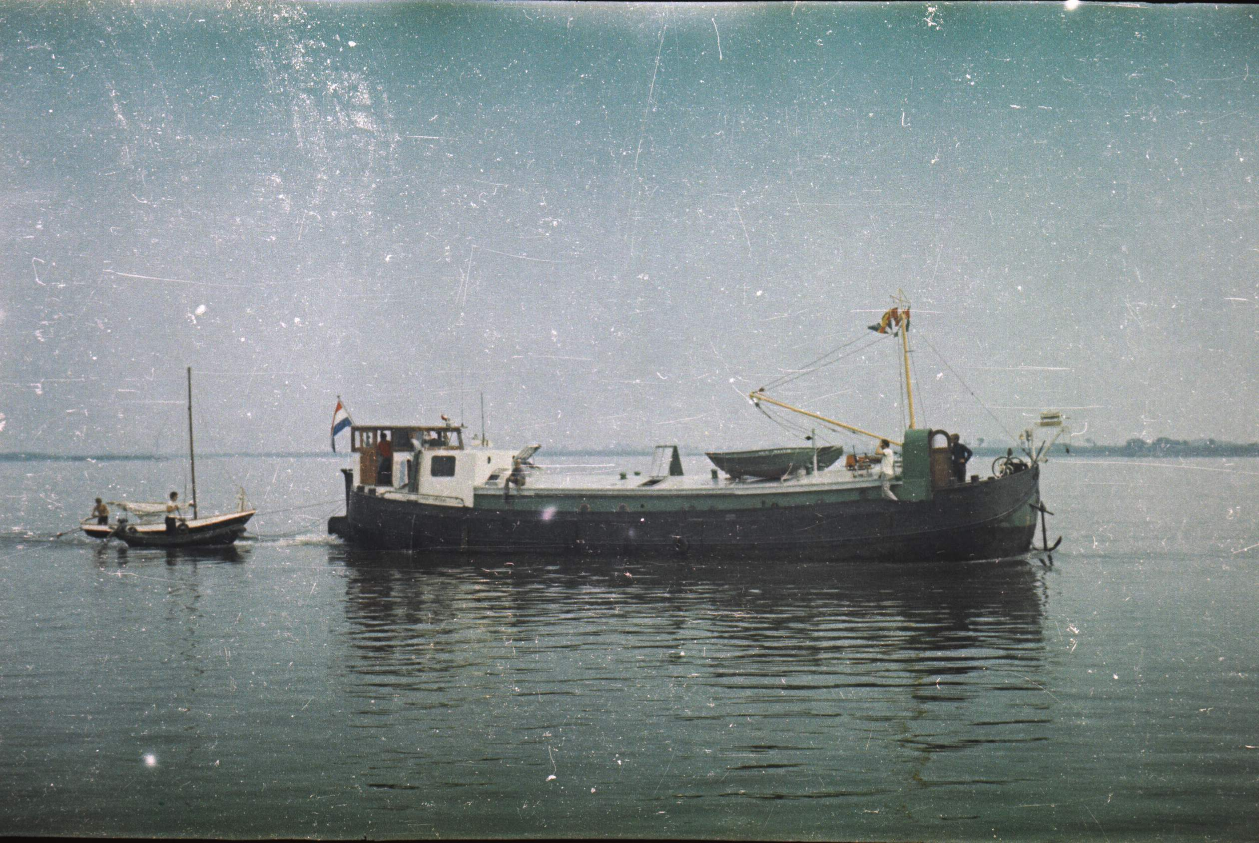 Het m.s. Baukje van de Lischgroep Rotterdam omstreeks 1970, opvarend op de Dordtse Kil Lengte: 20,66 m Breedte: 4,64 m Hoofdmotor: Lister Blackstone 28 pk